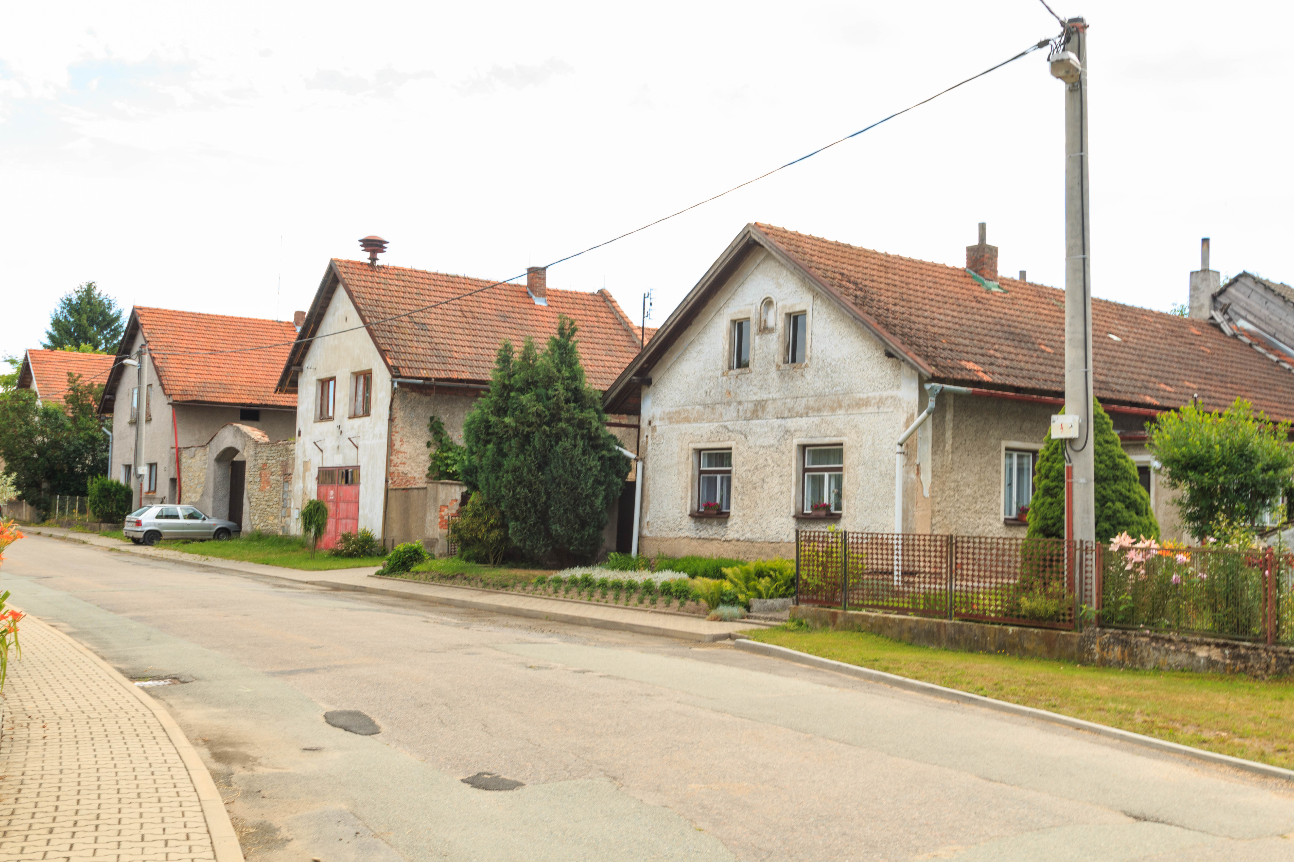 Plchovice čp. 21